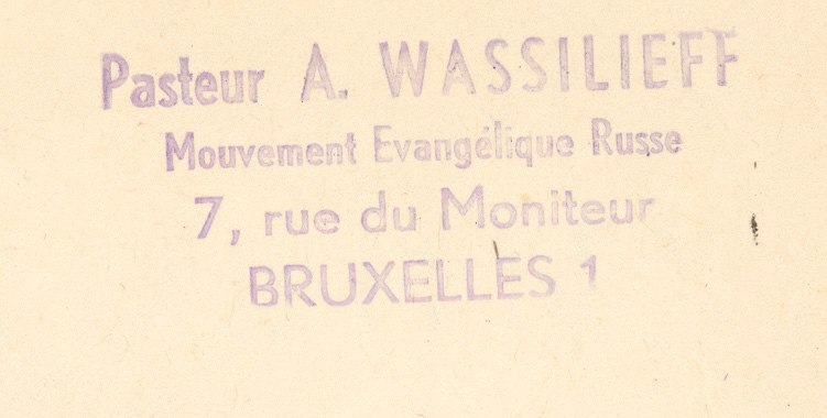 Книжный знак штамп